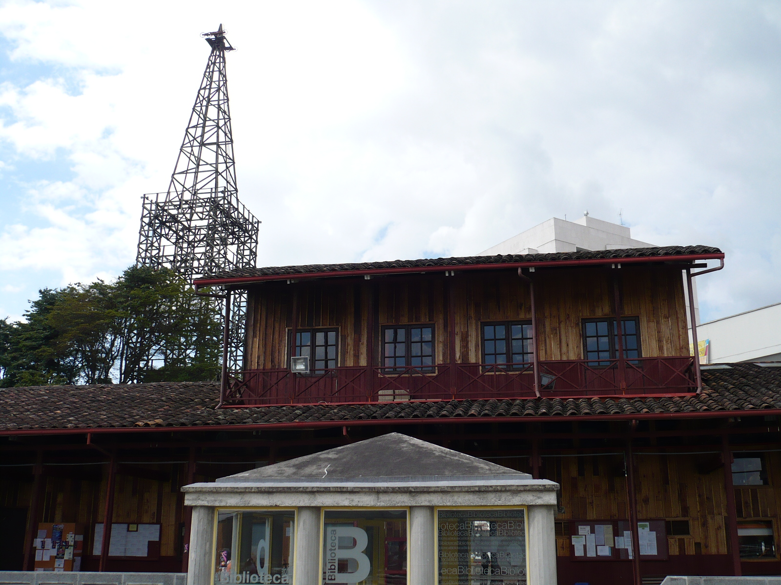 La torre del Cable y la antigua estación, ahora facultad de arquitectura de la Universidad Nacional de Colombia, junto con la entrada a su biblioteca. Manizales